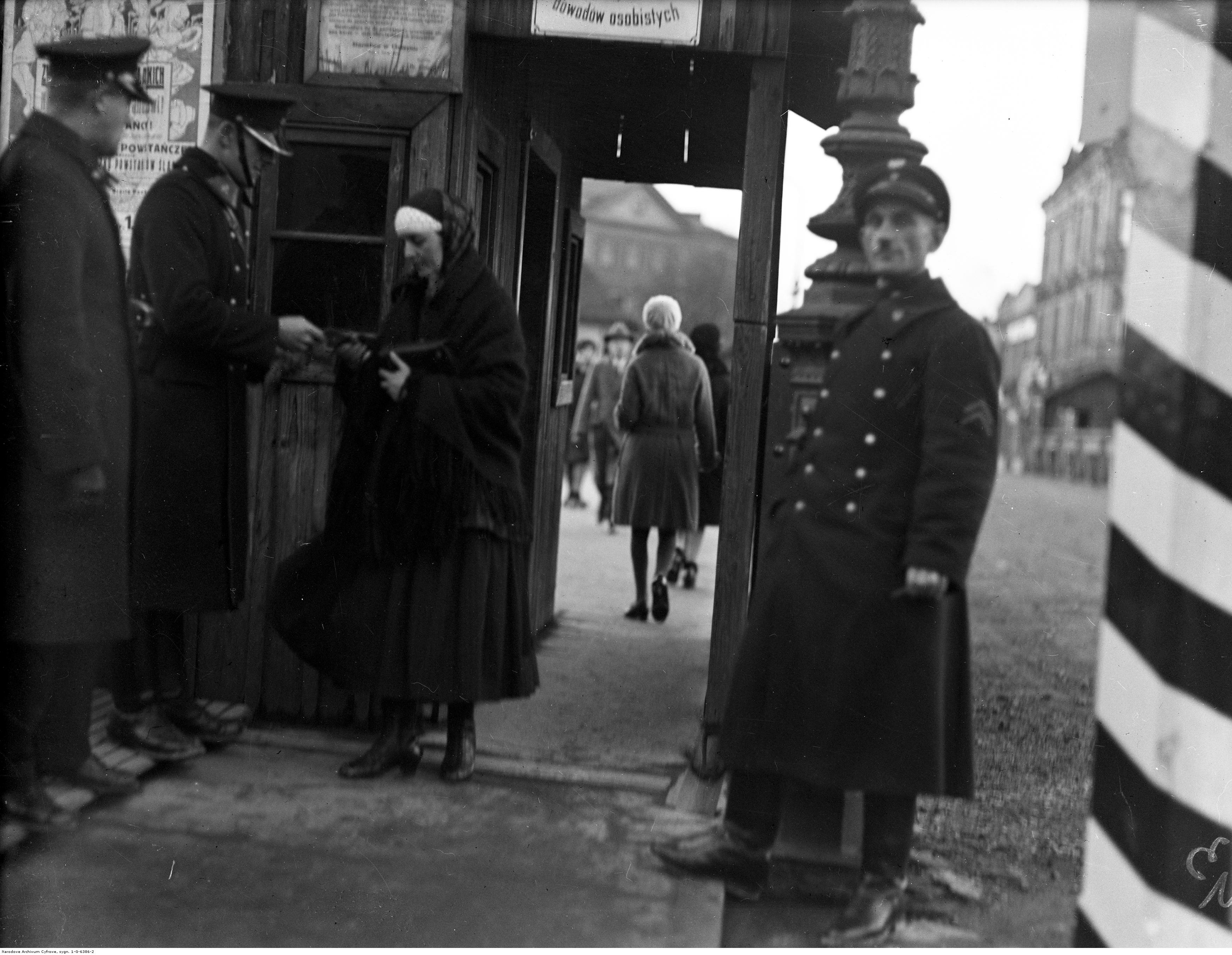 Posterunek Straży Granicznej na moście w Cieszynie (granica z Czechosłowacją) - kontrola na przejściu; 1928 r. Koncern Ilustrowany Kurier Codzienny - Archiwum Ilustracji. Sygnatura: 1-G-6386-2